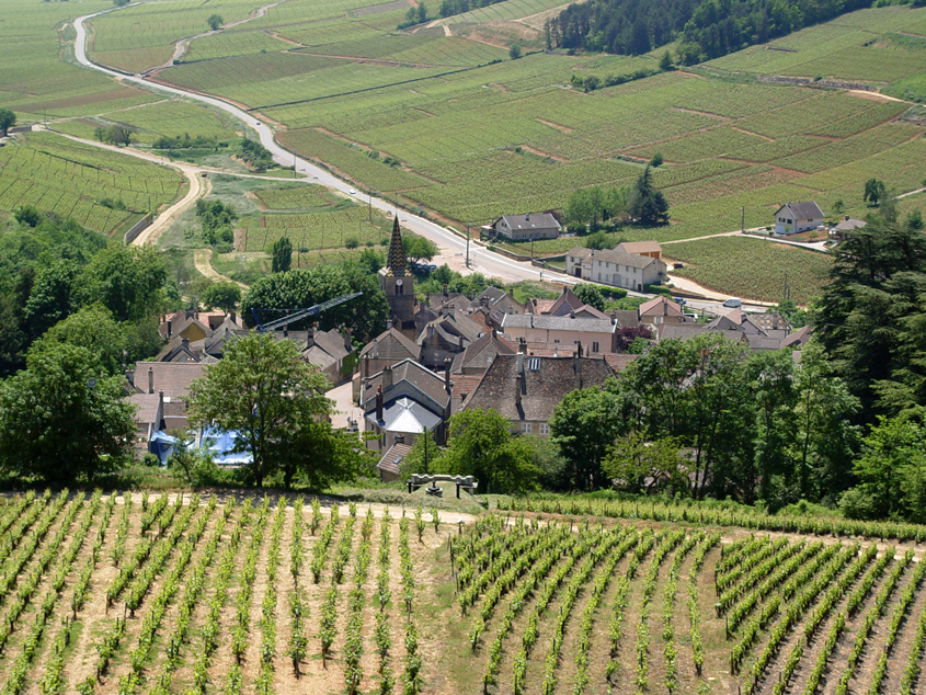 Pernand-Vergelesses